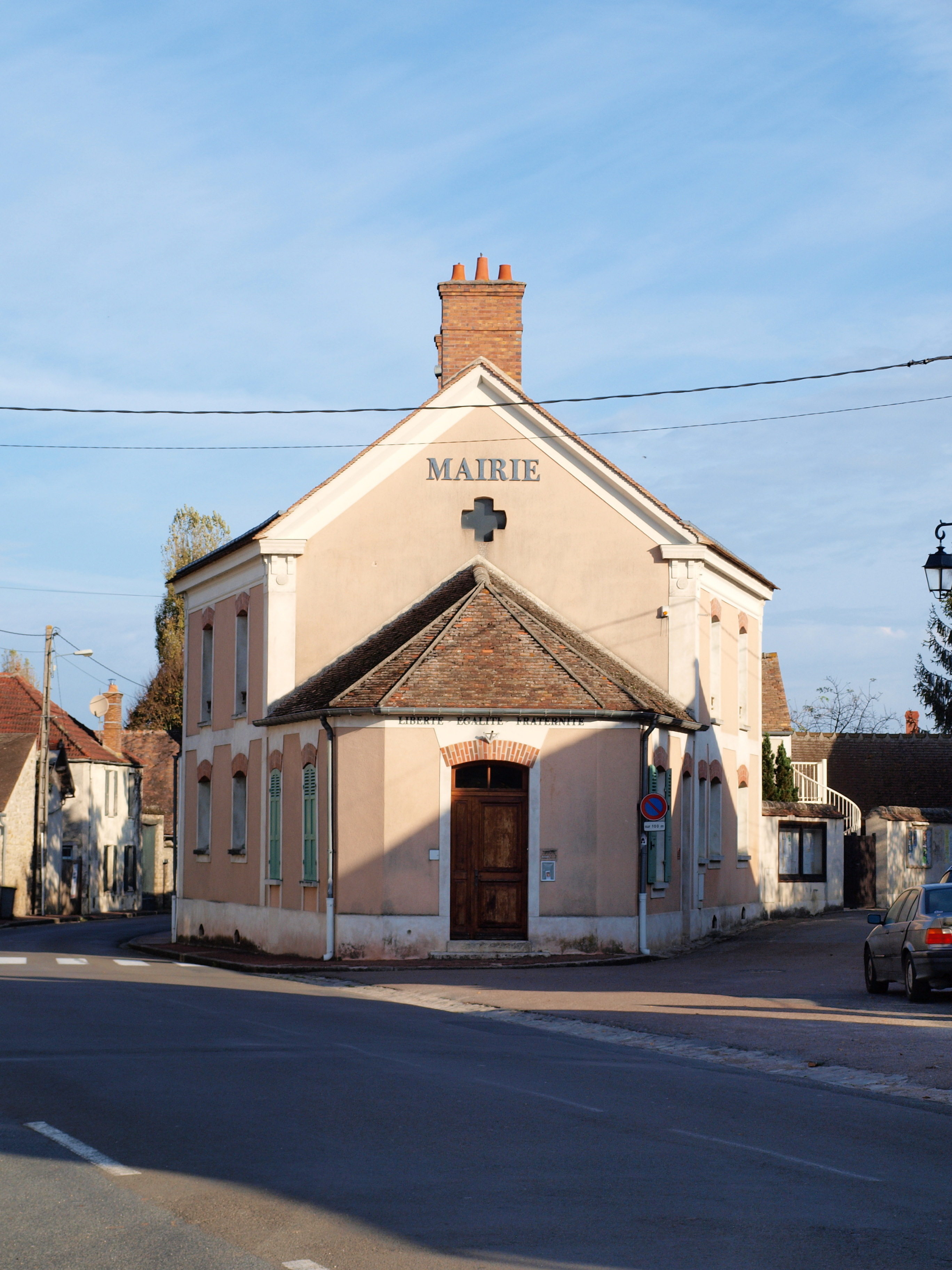 Le Vaudoué (Seine-et-Marne, France) ; mairie